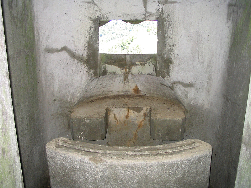 Notranjost bunkerja